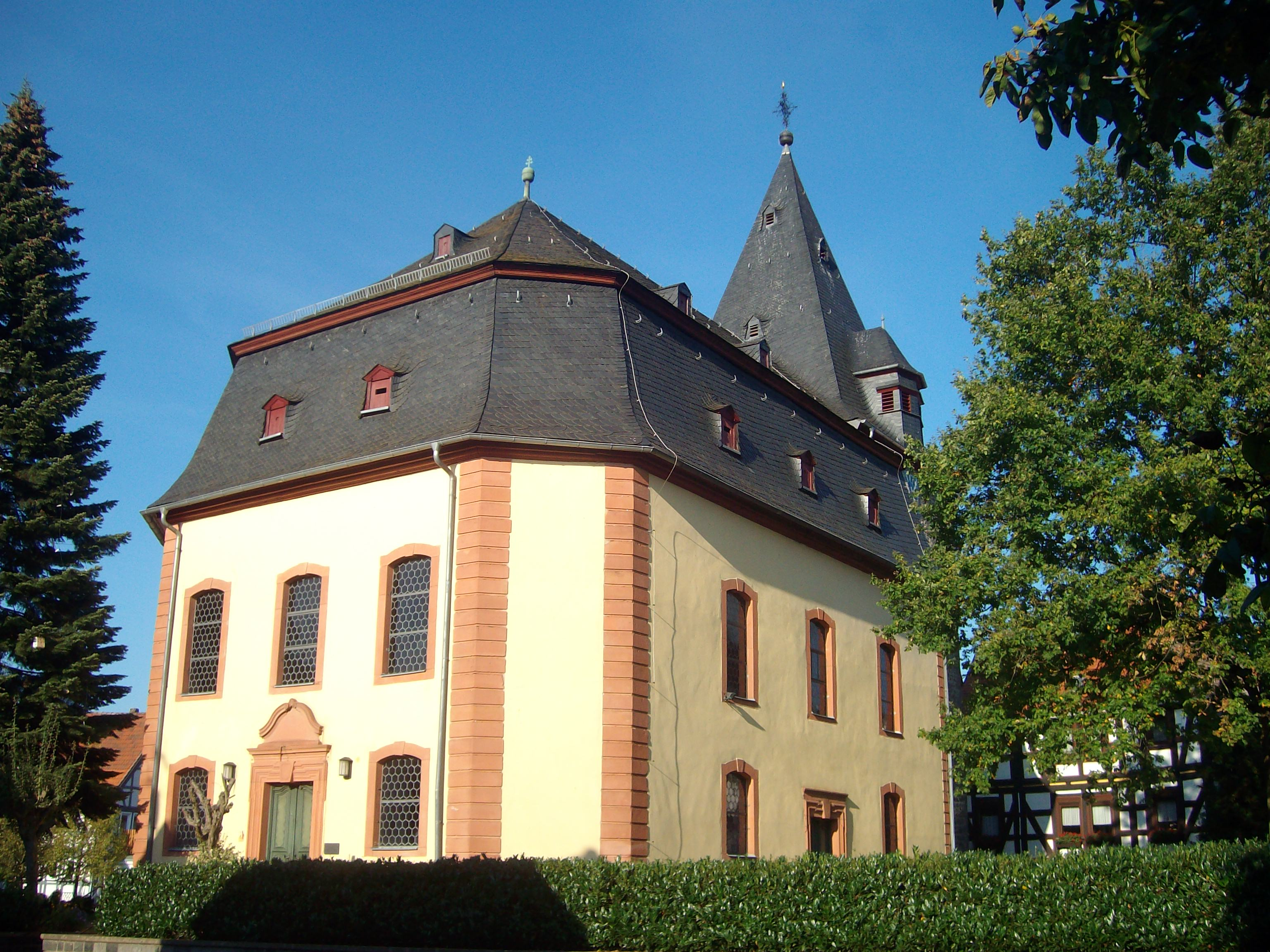 Südwestseite der Evangelischen Kirche Freienseen, Laubach, Landkreis Gießen, Hessen, Deutschland